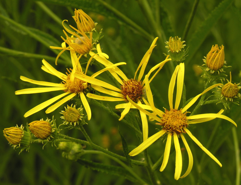 Pelkinė žilė (Senecio paludosus), žiedai Šeima. Astriniai (Asteraceae) Foto: Algirdas, 2006 m. liepos 22 d., Lietuva